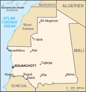 Karte von Mauretanien